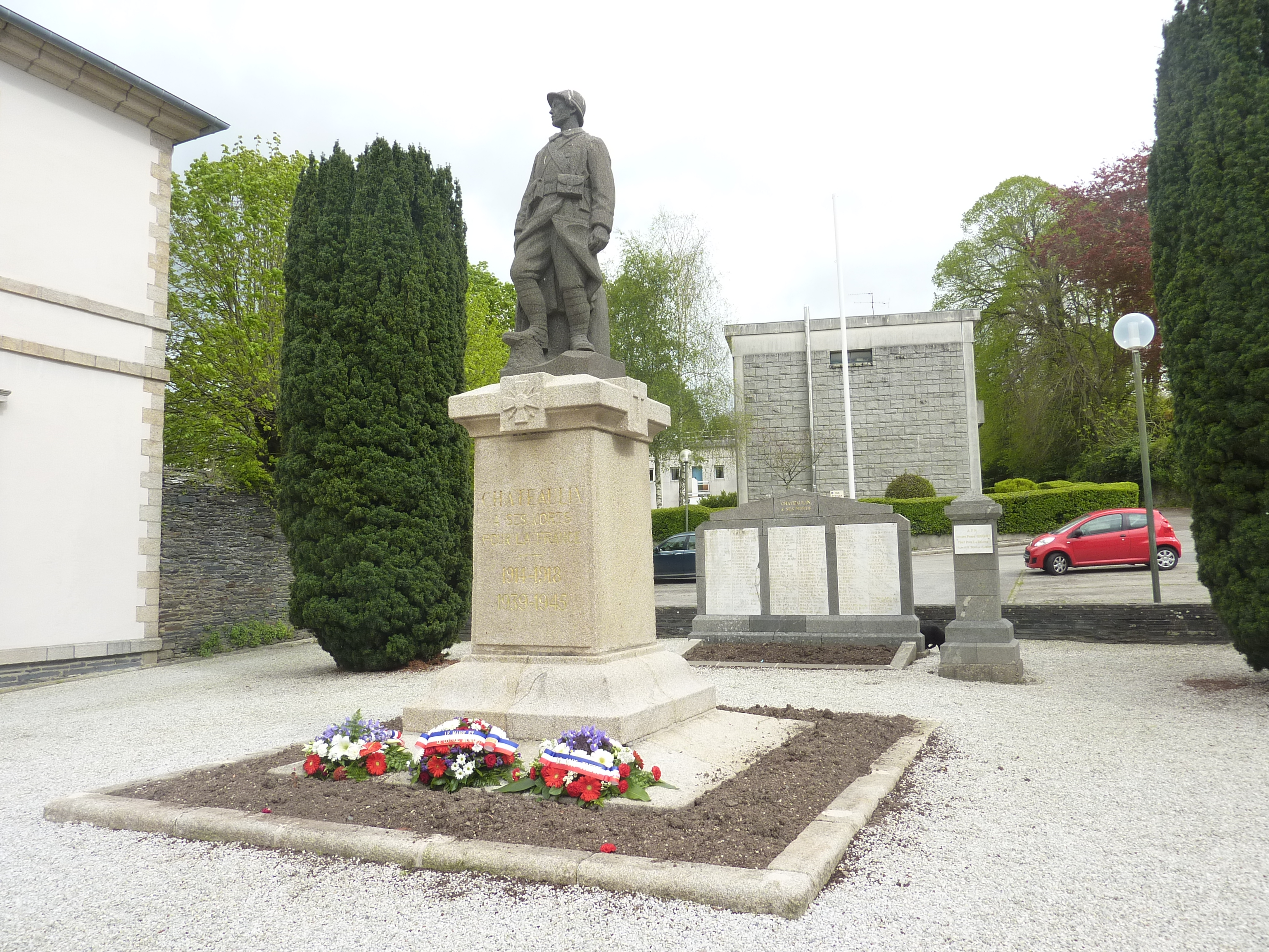 Châteaulin : le monument aux morts